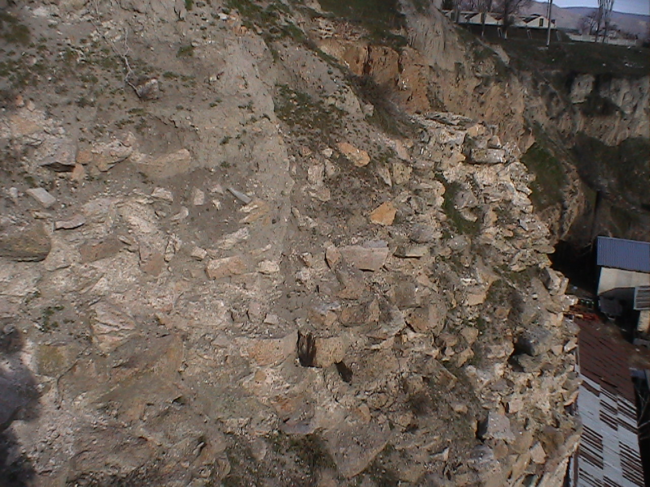 Cetatea Arrubium 02